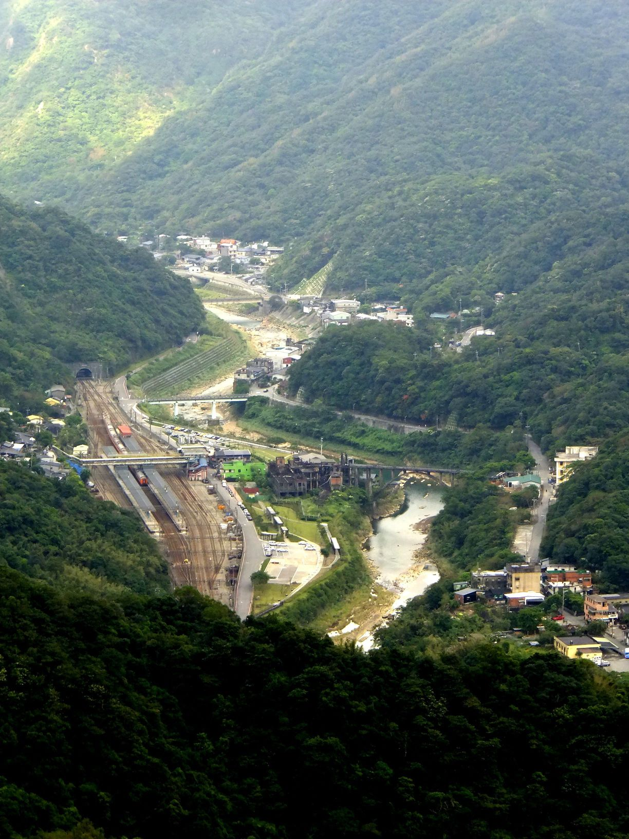 2012新北市瑞芳區猴硐